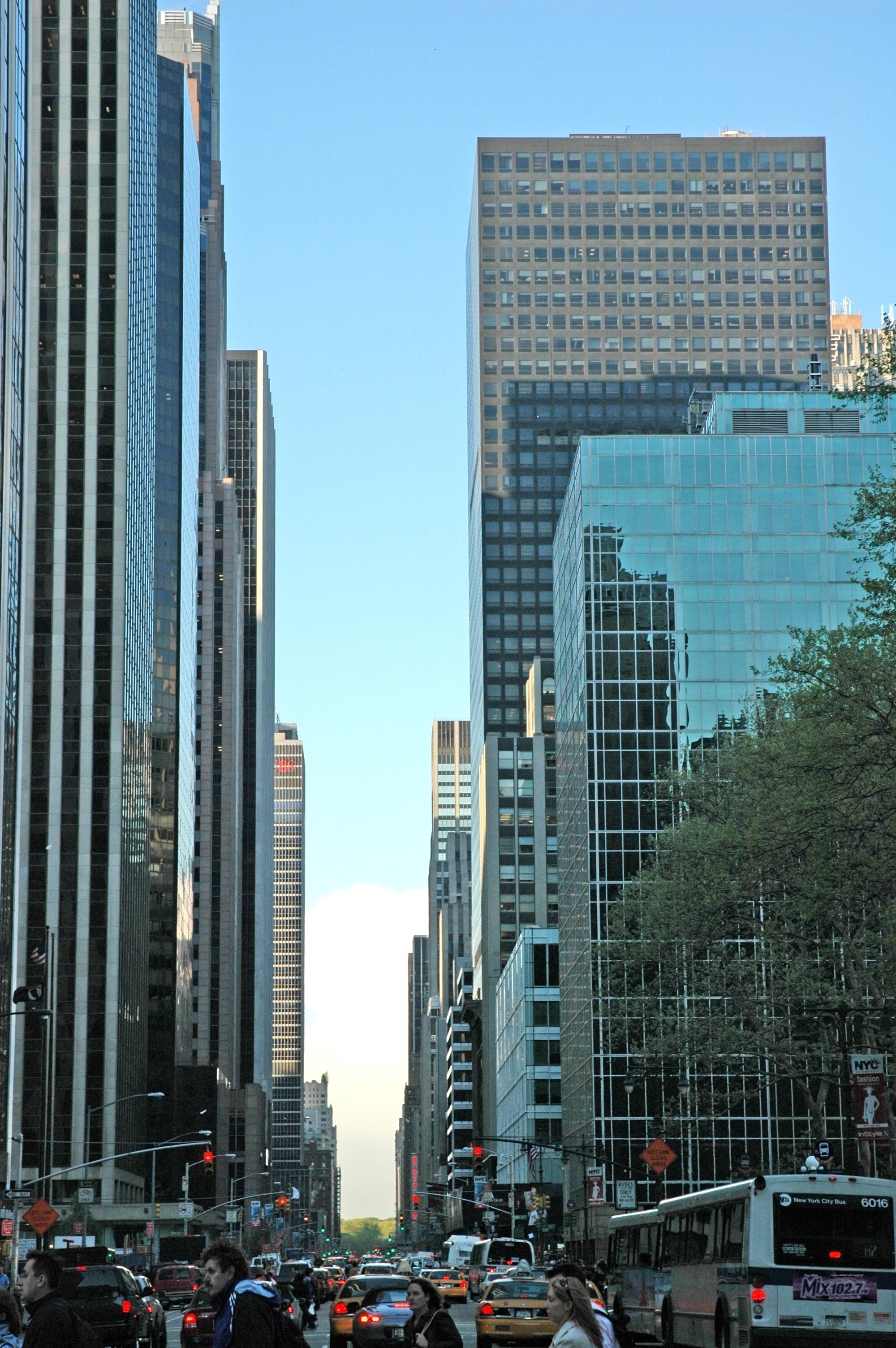 Les gratte-ciel de la Sixième Avenue.